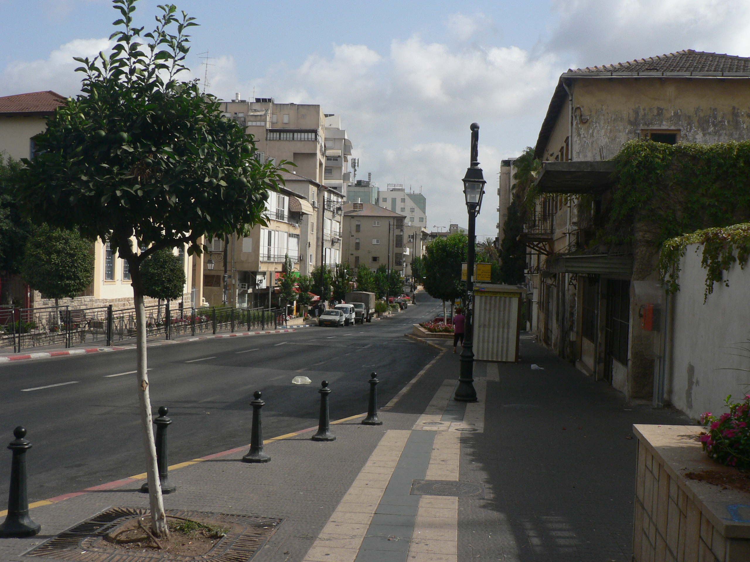 Rishon LeZion - Echad HaAm street ראשון לציון - רחוב אחד העם